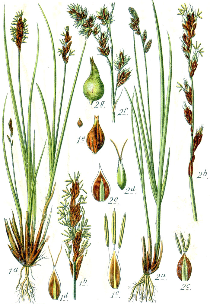 1: Carex appropinquata Schumach., syn. Carex paradoxa Willd. non J.F.Gmel., nom. ill. (1794) 2: Carex paniculata L. Original Caption 1. Trug-Segge, Carex paradoxa 2. Rispen-Segge, Carex paniculata